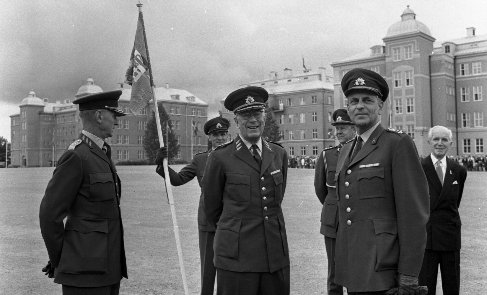 Kung Gustaf VI Adolf besöker Örebro Livregementes Grenadjärer i Grenadjärstaden. Flera män står uppställda på regementsgården klädda i militäruniformer liksom kungen. En av militärerna har en befälsbricka runt halsen och en fana i handen. Till höger står en man i svart kostym, vit skjorta och ljus slips.